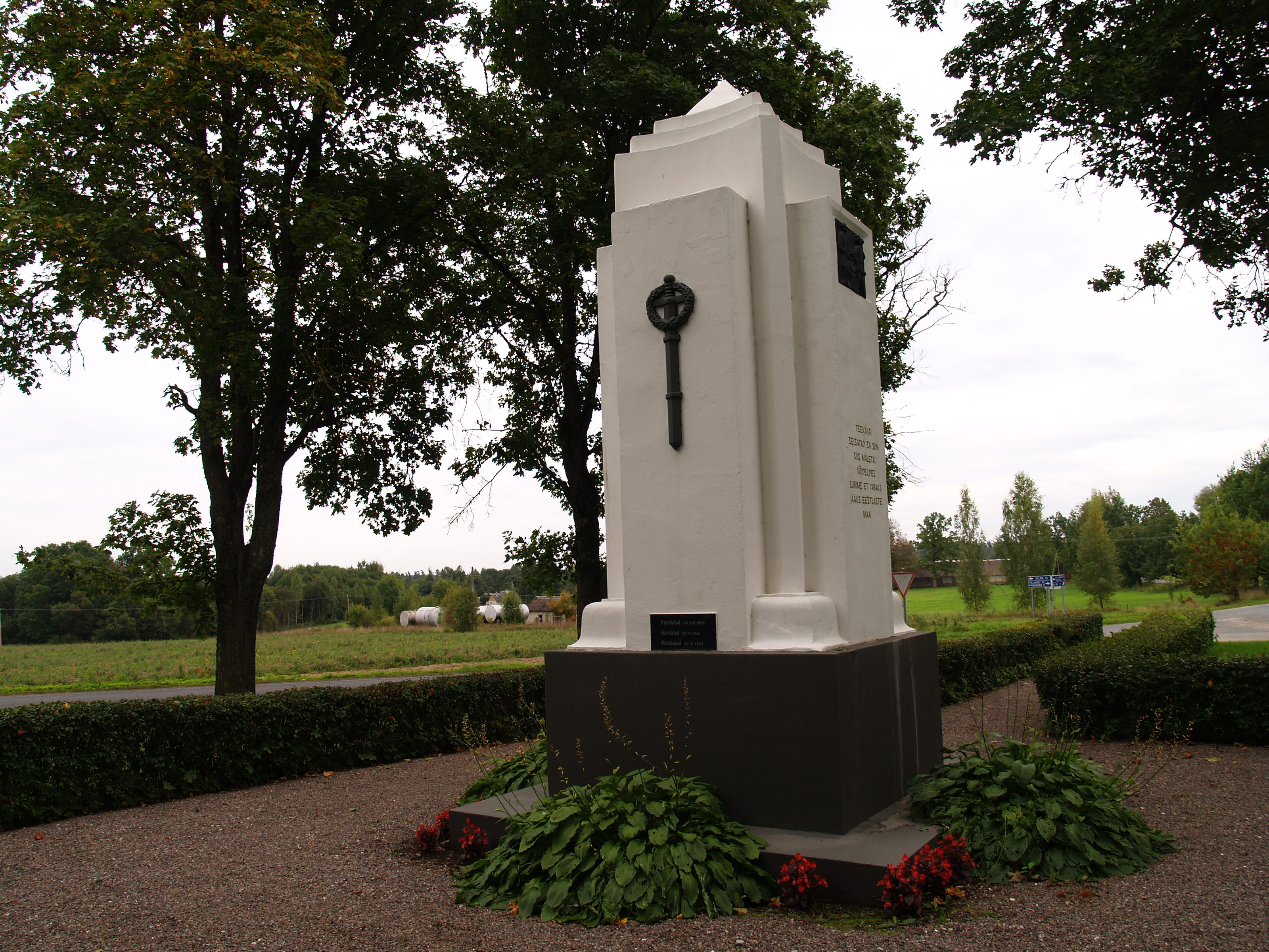 Vabadussõja Kärstna lahingu mälestussammas